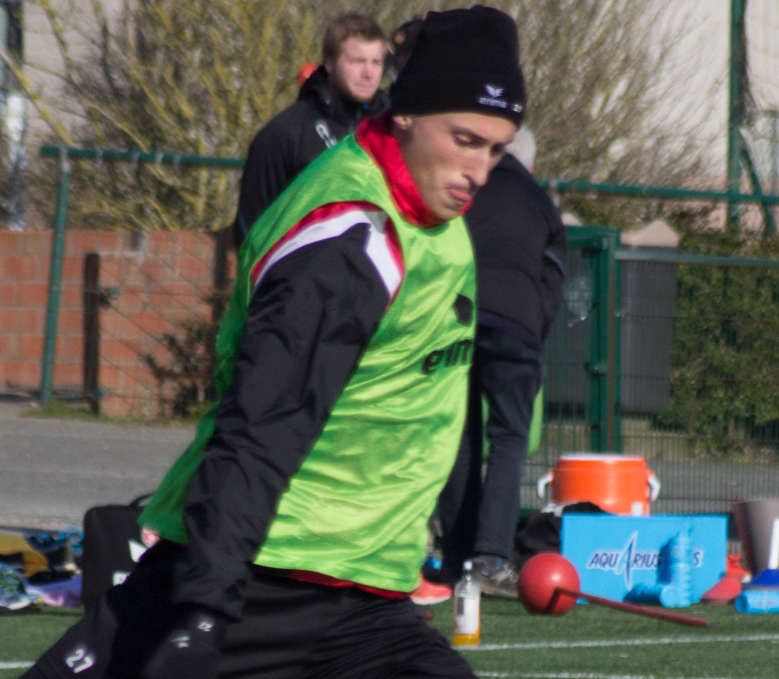 Entrainement du Royal Excel Mouscron, Futurosport, Mouscron. Le 22 Février 2018.